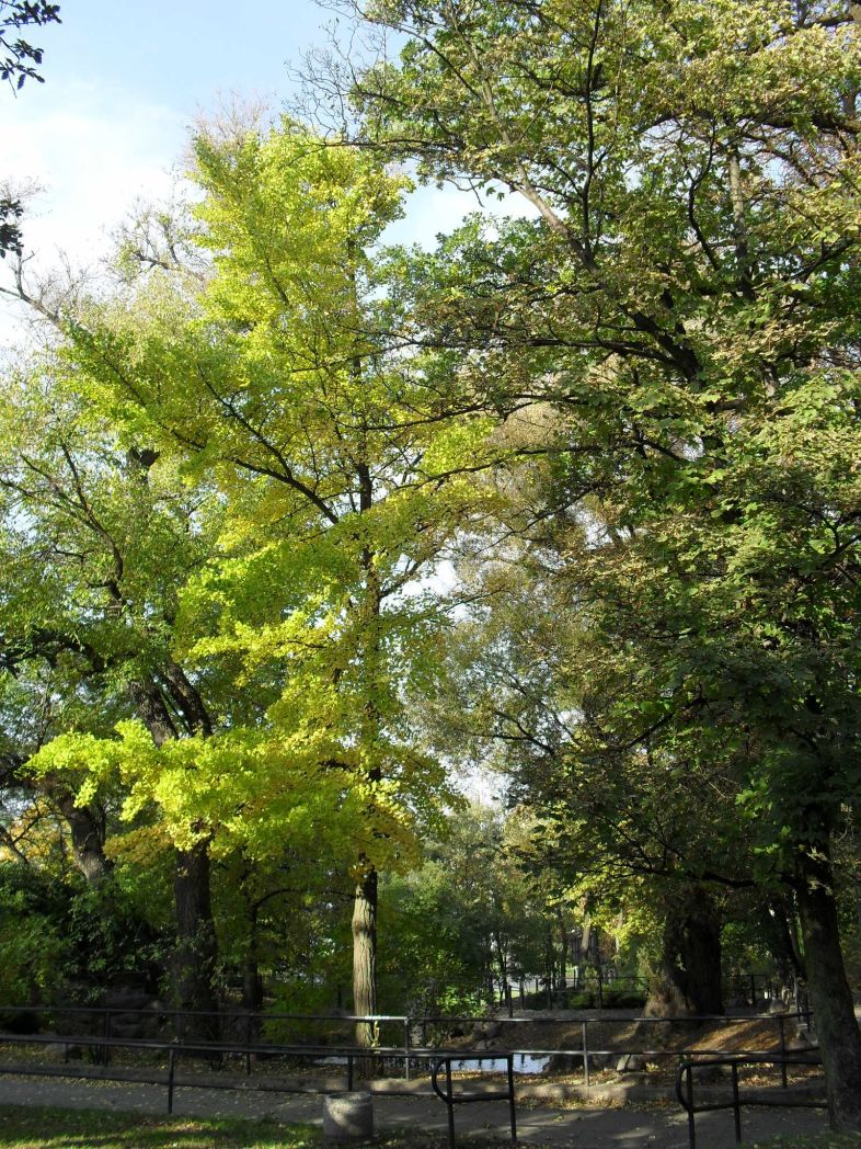 Pomnik przyrody miłorząb dwuklapowy w parku im. gen. H. Dąbrowskiego w Bydgoszczy